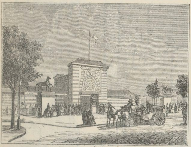 Entrée de l'Hippodrome installé en 1856 rond-point de la plaine de Passy. Il a été détruit par un incendie dans la nuit du 1er octobre 1869.